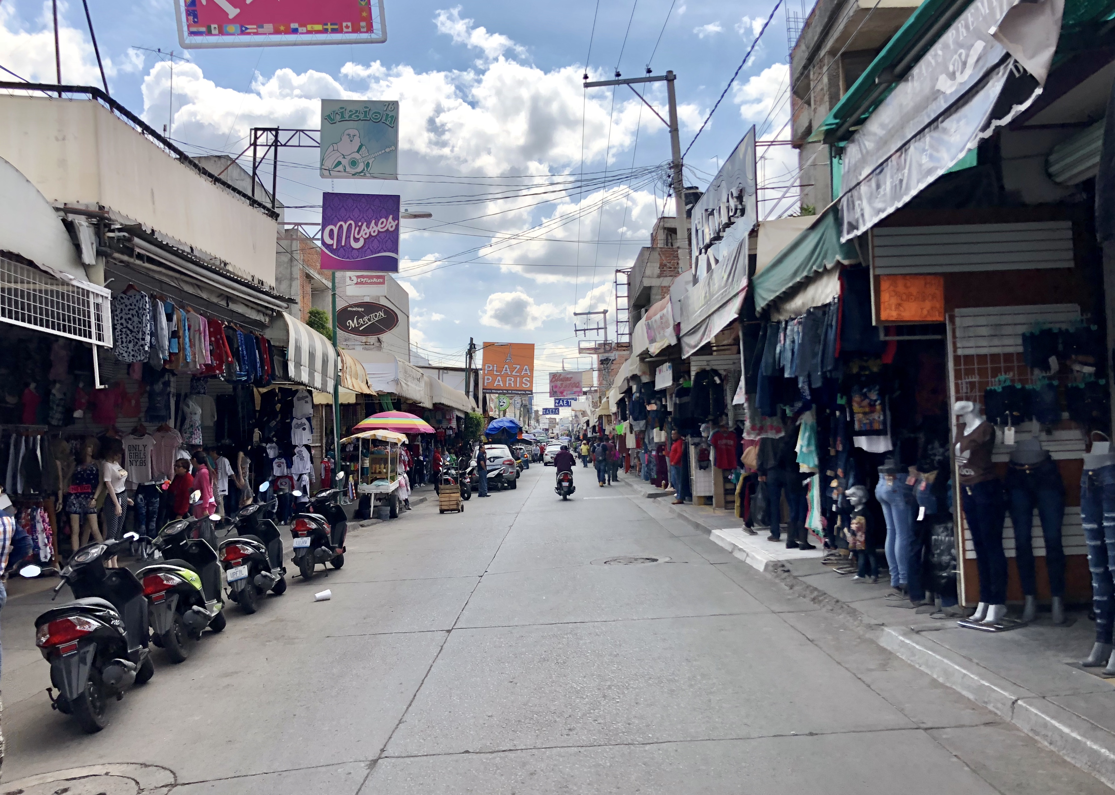 Zona Comercial Textil Uriangato en la Av. Álvaro Obregón, imagen que muestra los puestos de ropa de Uriangato.